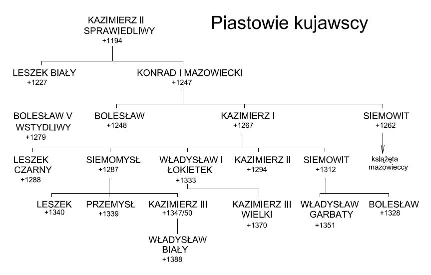 Piastowie kujawscy - genealogia